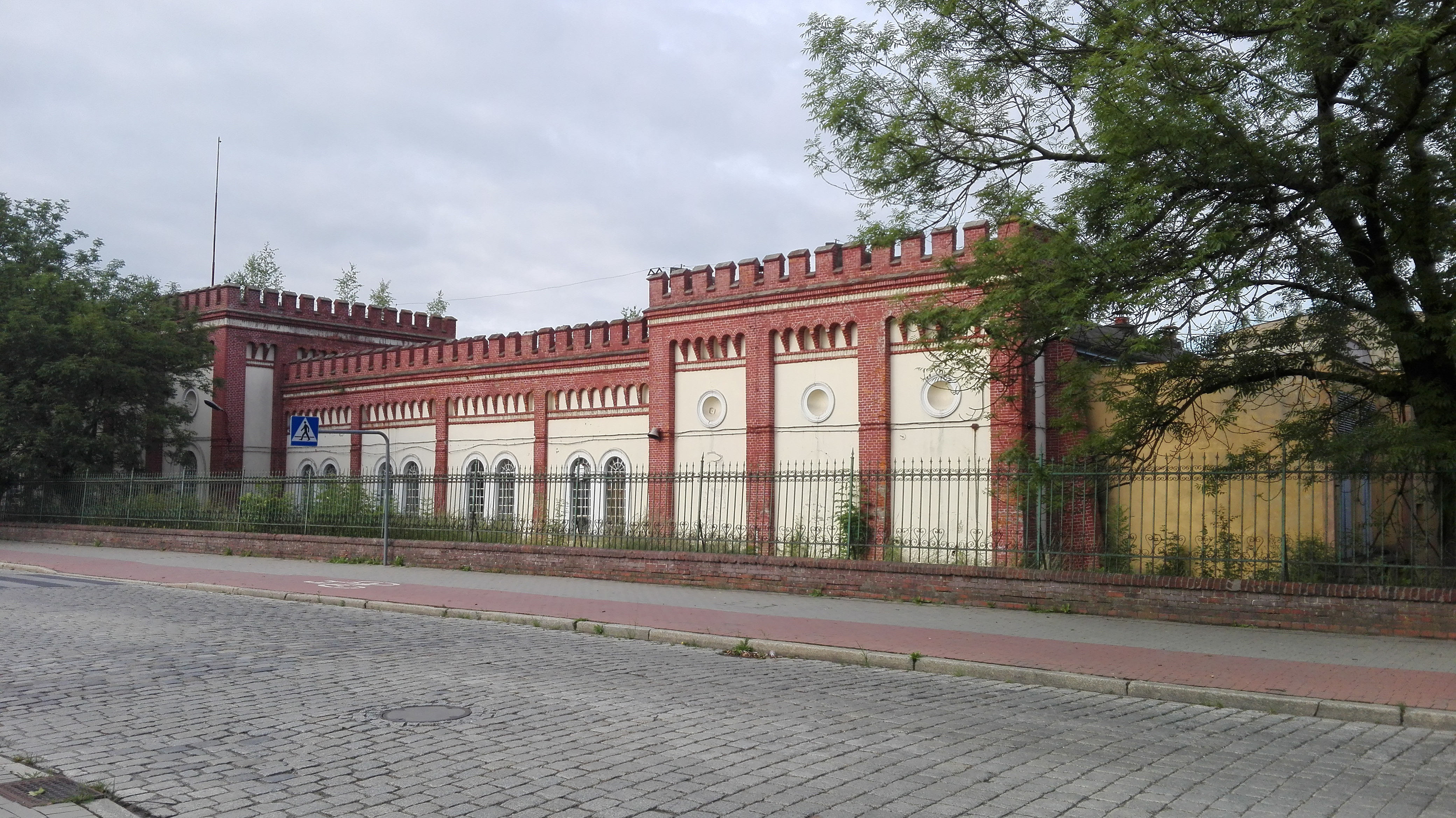 Prudnik - byłe Zakłady Przemysłu Bawełnianego „Frotex“ S.A.